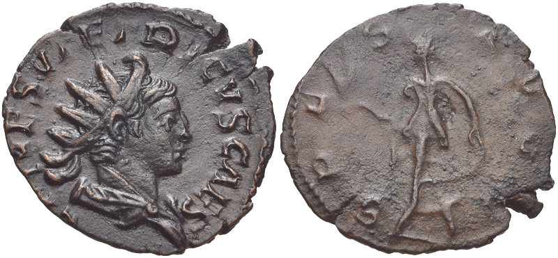 Antoniniano de Tétrico II cunhado no final de 272 ou começo de 273